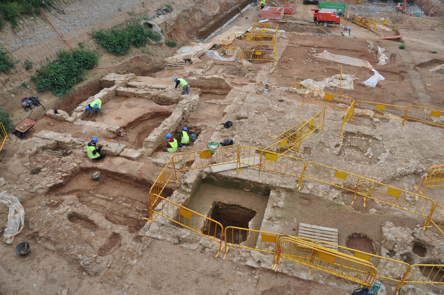 Vista general del complex de producció agropecuària i de les premses de la vil.la romana del Pont del Treball Digne (Barcelona). Pars rustica.